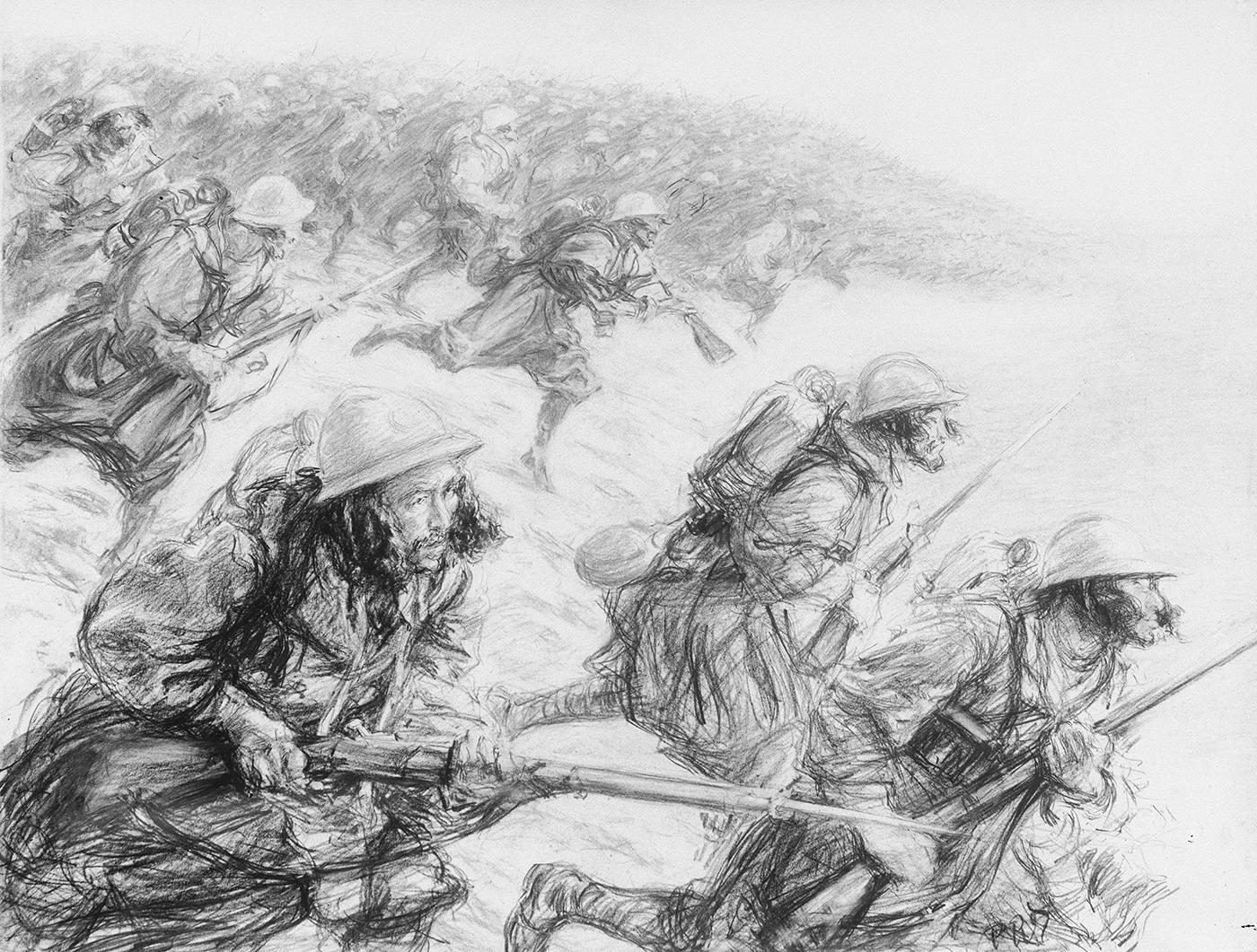 Les troupes coloniales marocaines dans la seconde bataille de la Marne, « Attaque du 1er régiment de tirailleurs marocains, le 28 juin 1918, à 5 h 5 m », dessin de Paul Renouard